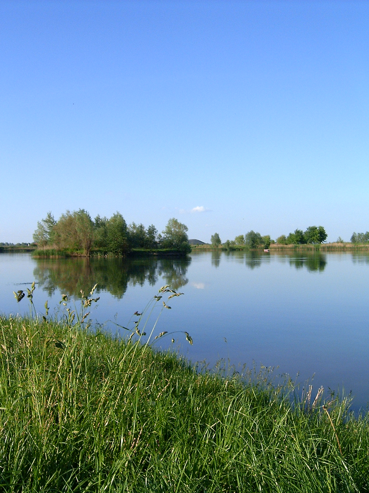 Radymno lake. Poland. My own creation. Jakub Nietrzeba.